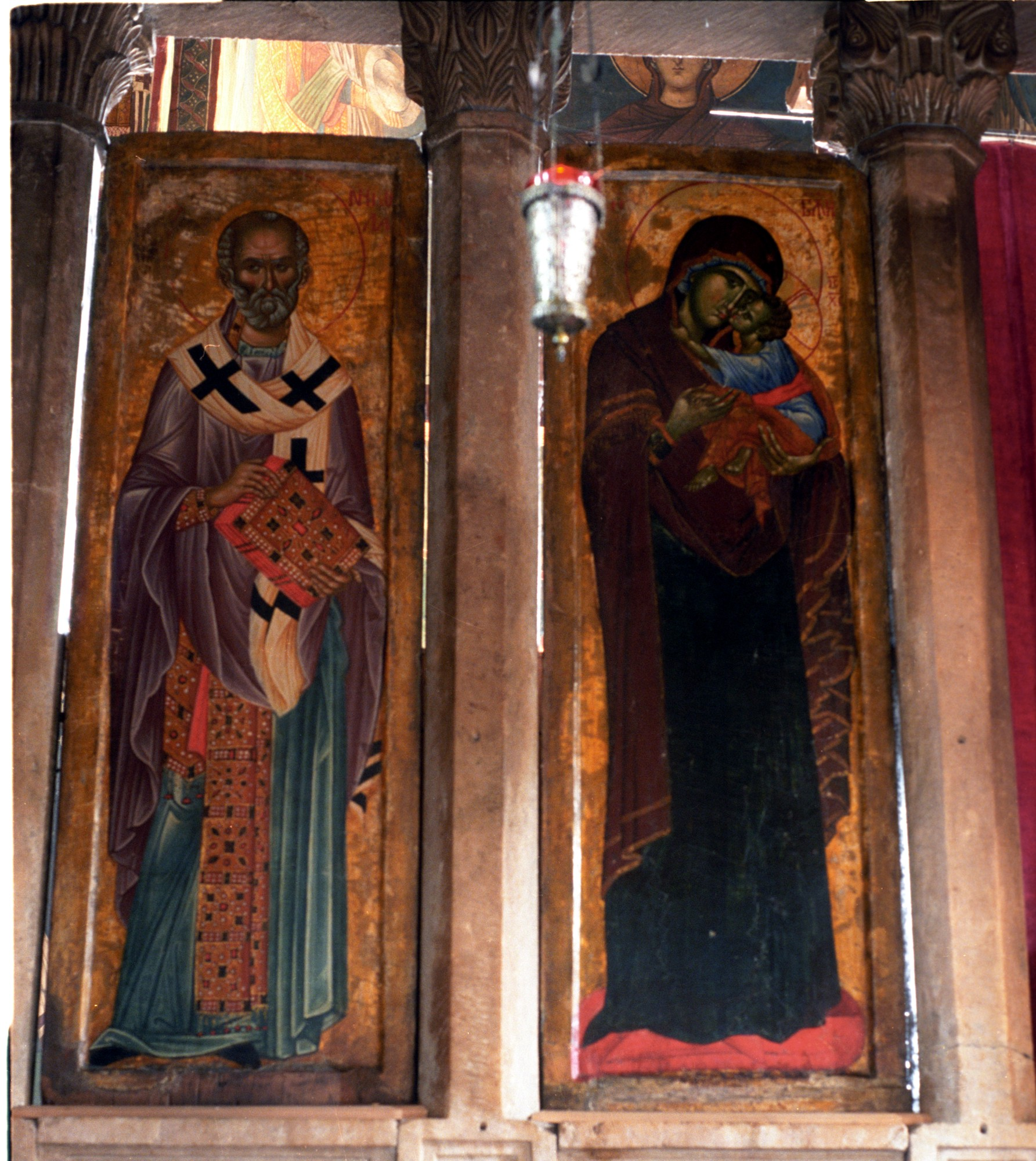 Ikone der Gottesmutter und eines Heiligen von 1350.